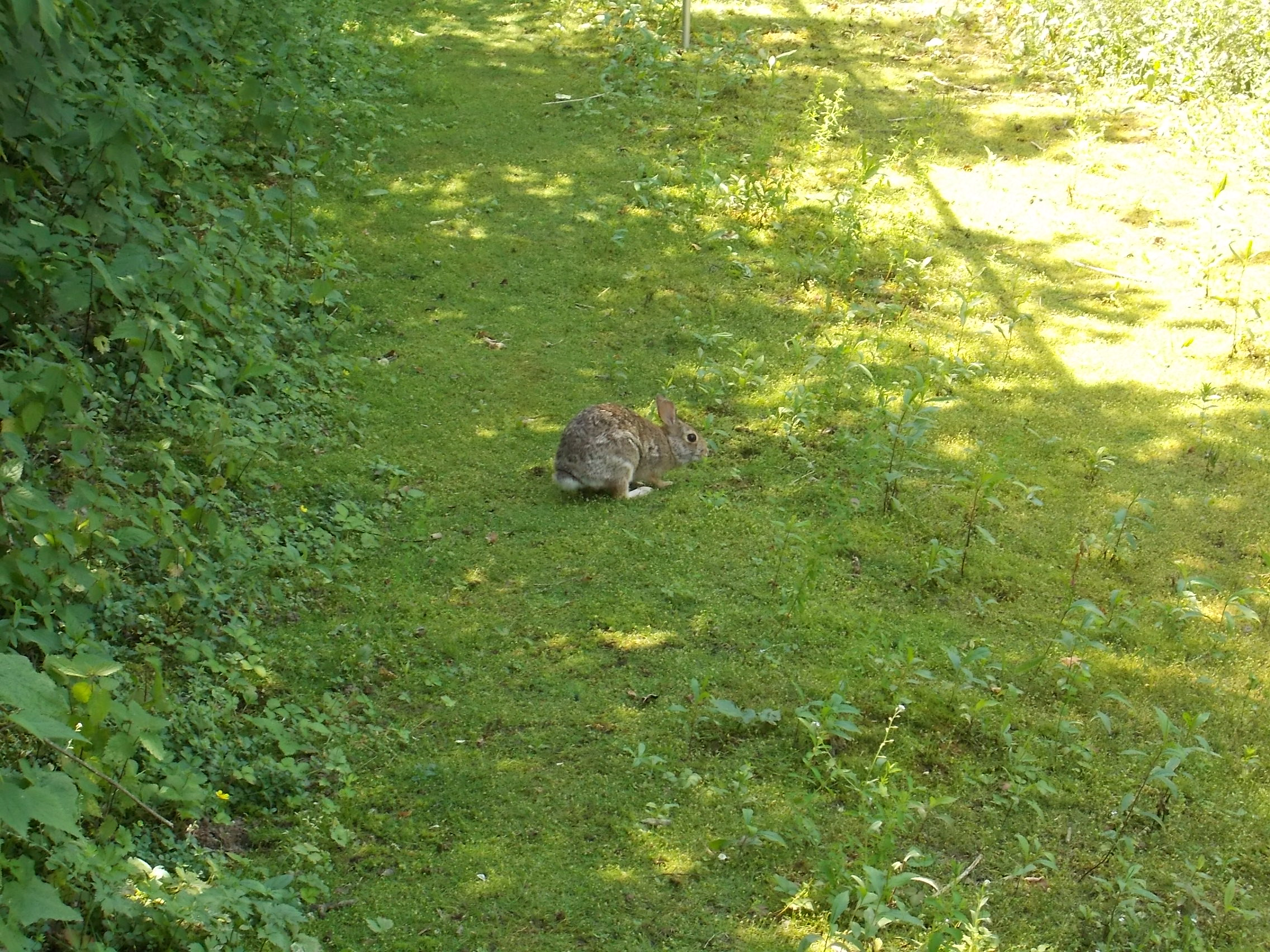 riserva naturale della palude di Casalbeltrame (Q61911726)